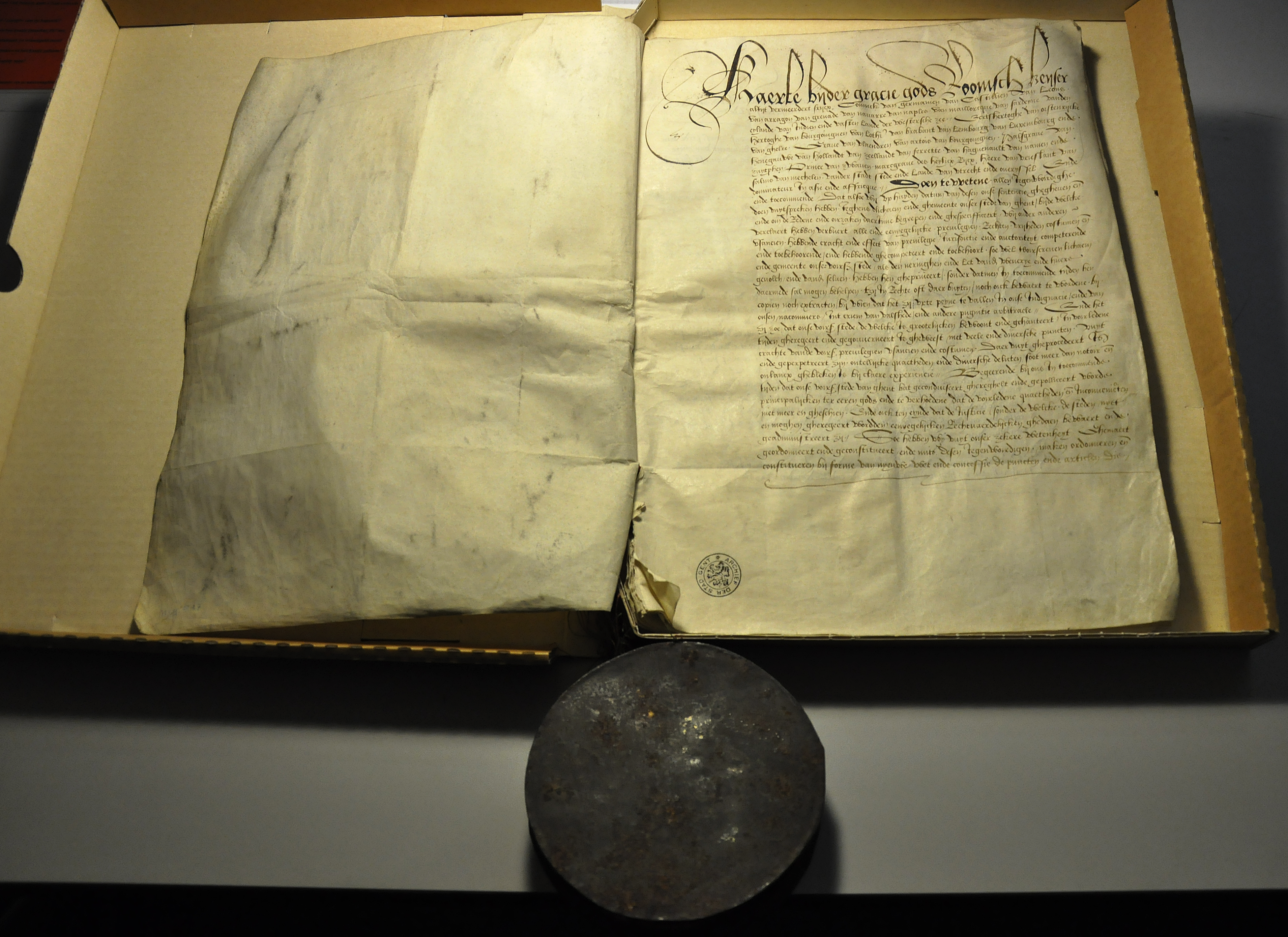 De keure Concessio Carolina waarbij keizer Karel V de vrijheden van de stad Gent beknotte en een aantal maatregelen oplegde - bewaard in De Zwarte Doos te Gent